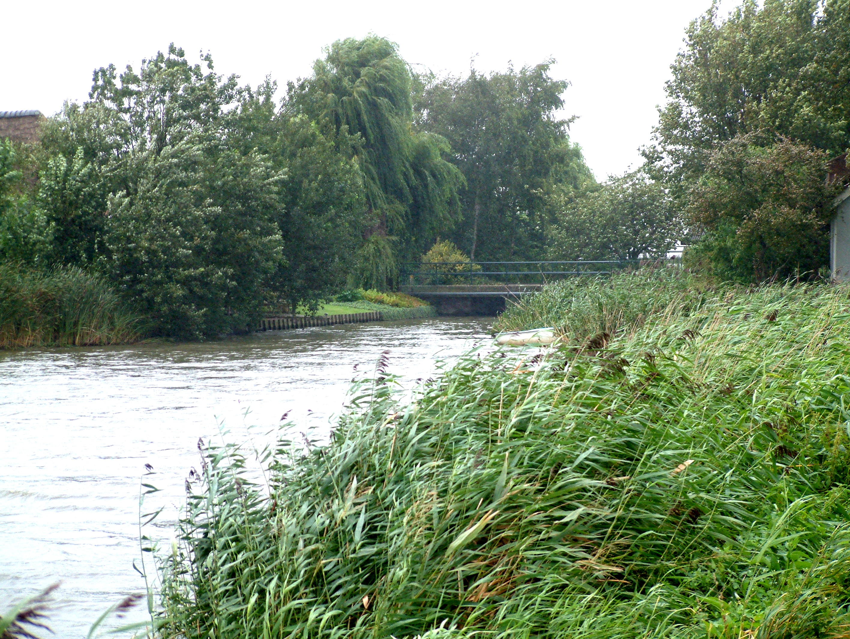 Bruggen over de Rotte (zie overlegpagina)